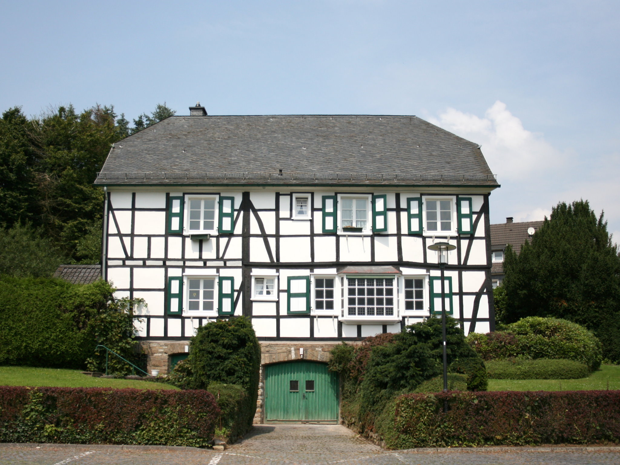 Altes Pfarrhaus, Bergstraße 35 in Kürten